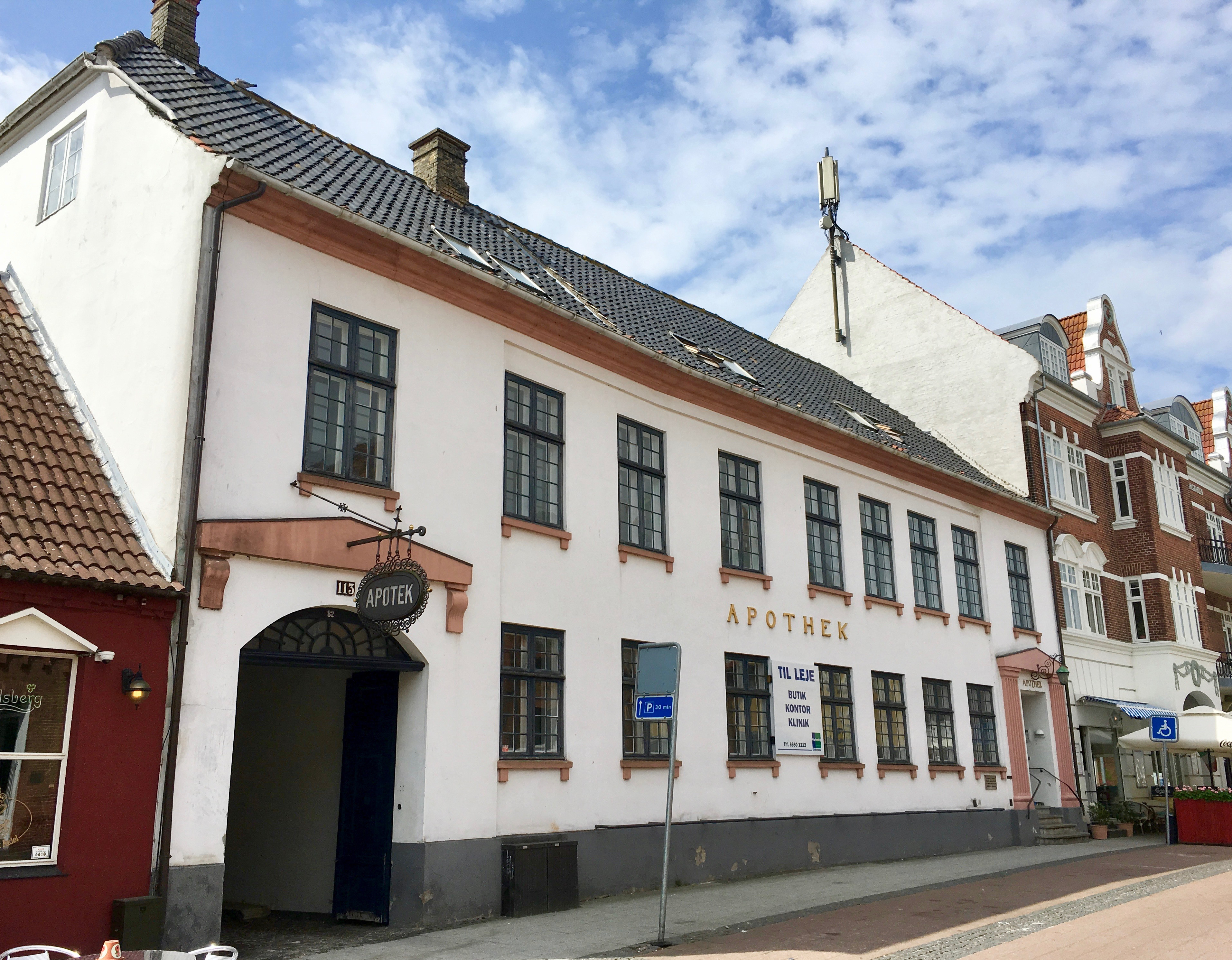 Apoteket i Vordingborg, Sjælland